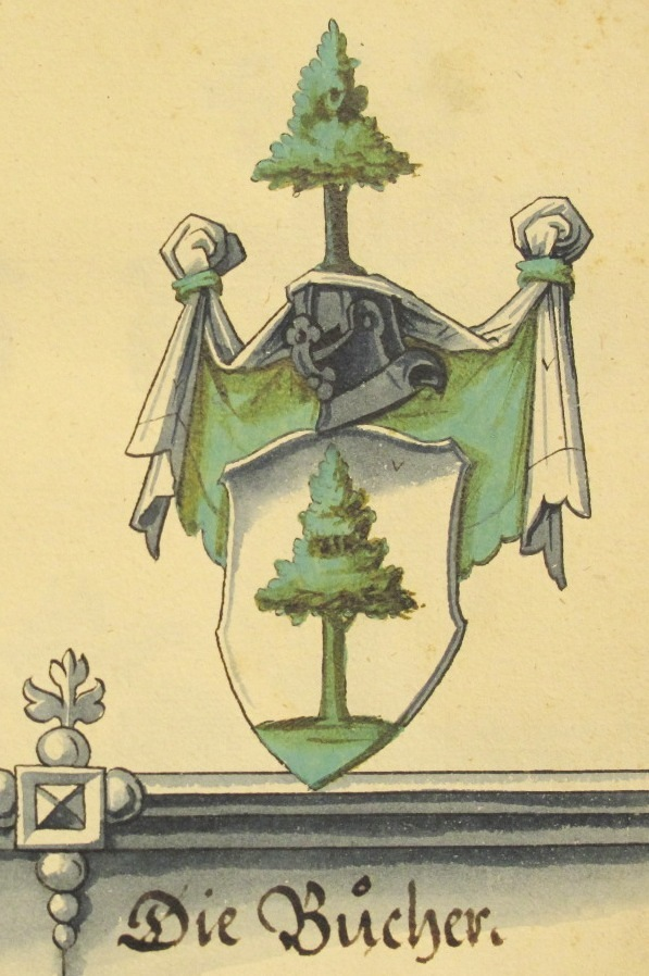 Staatsarchiv Bern, DQ 891, fol. 62r (Detail)